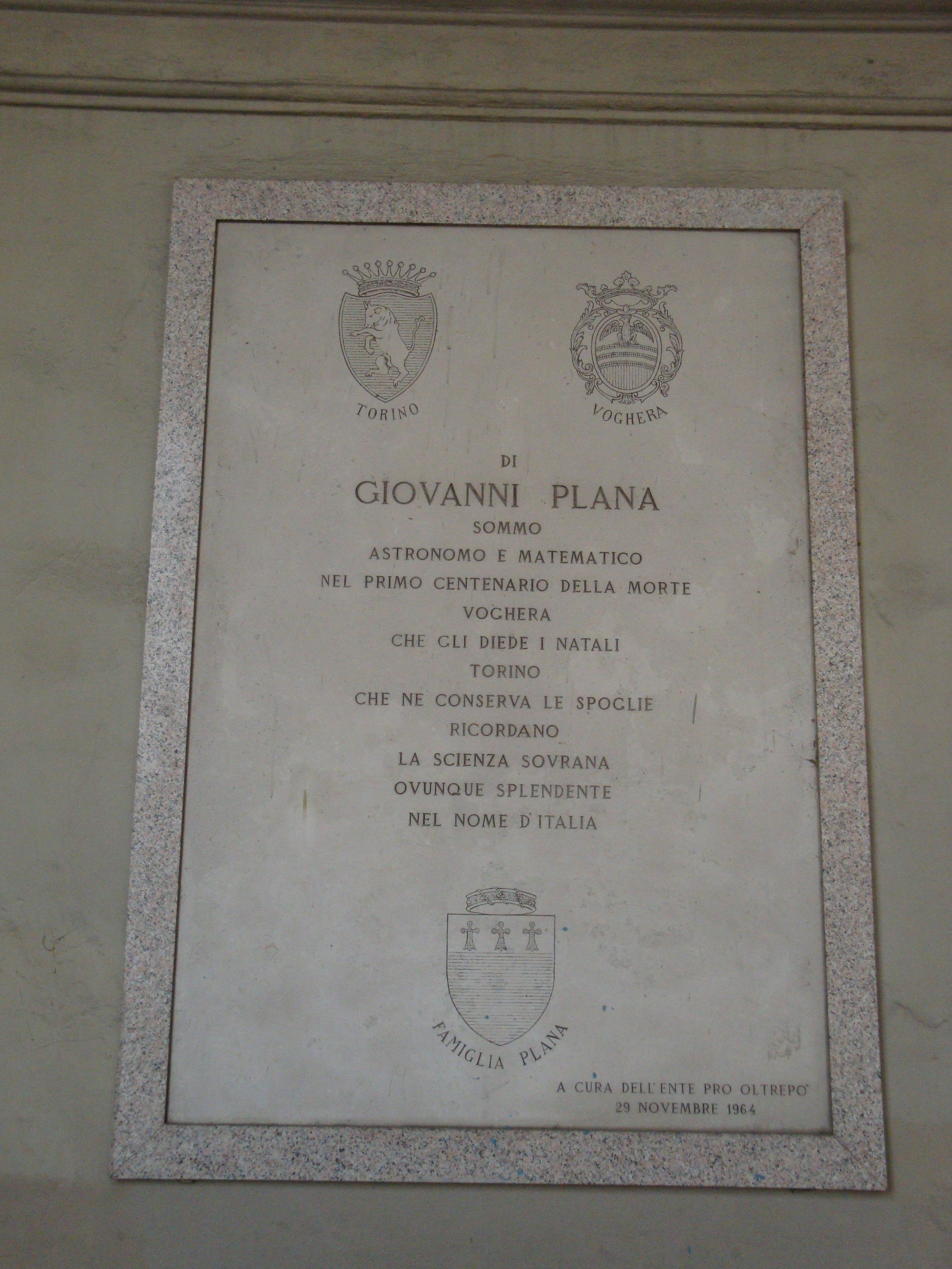 Autore: Tony Frisina - Alessandria la lapide è sul Municipio di Voghera, mentre la casa natale di Plana è in Via Emilia